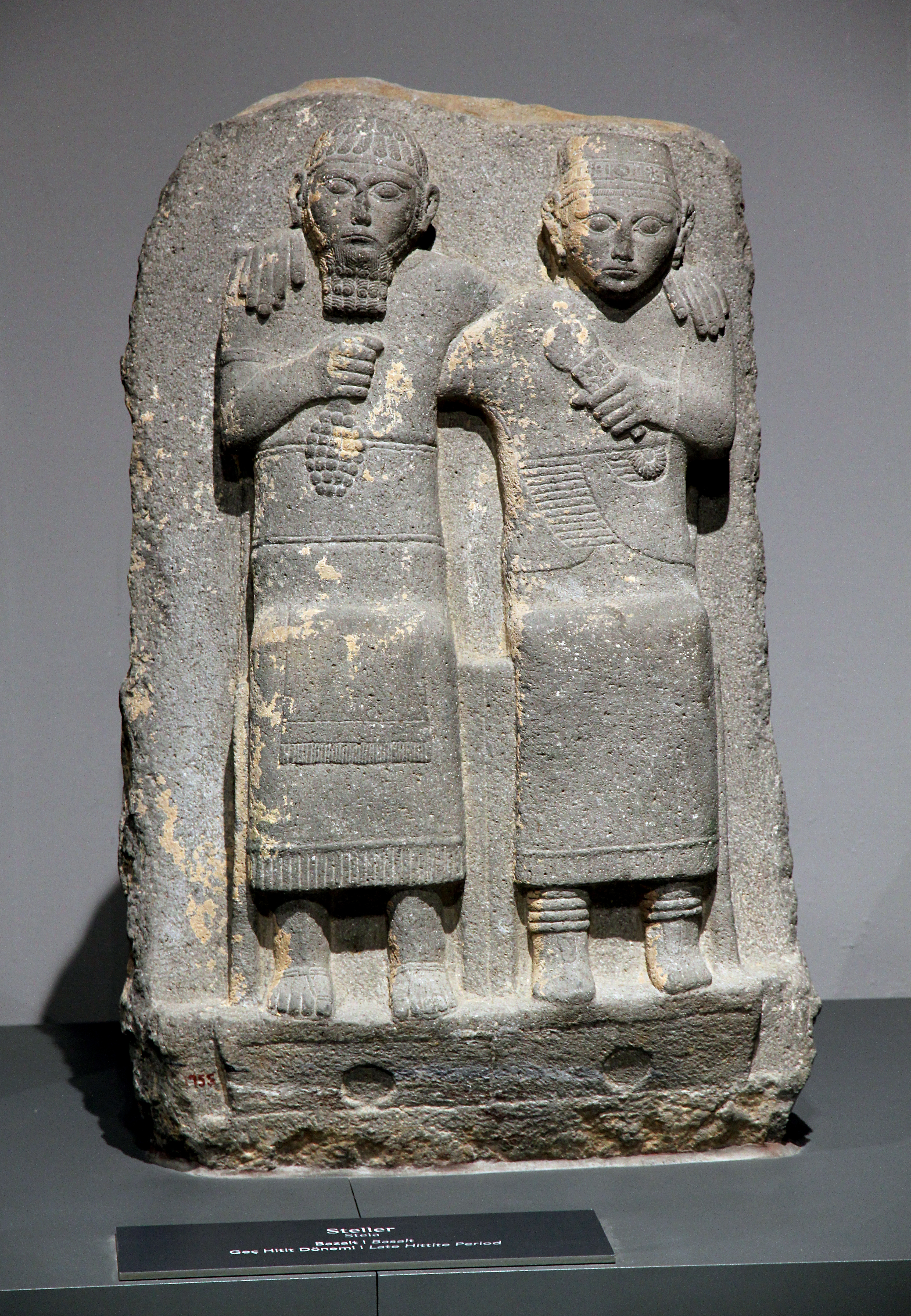 Archäologisches Museum Adana, Südtürkei, späthethitische Stele Maraş A/1